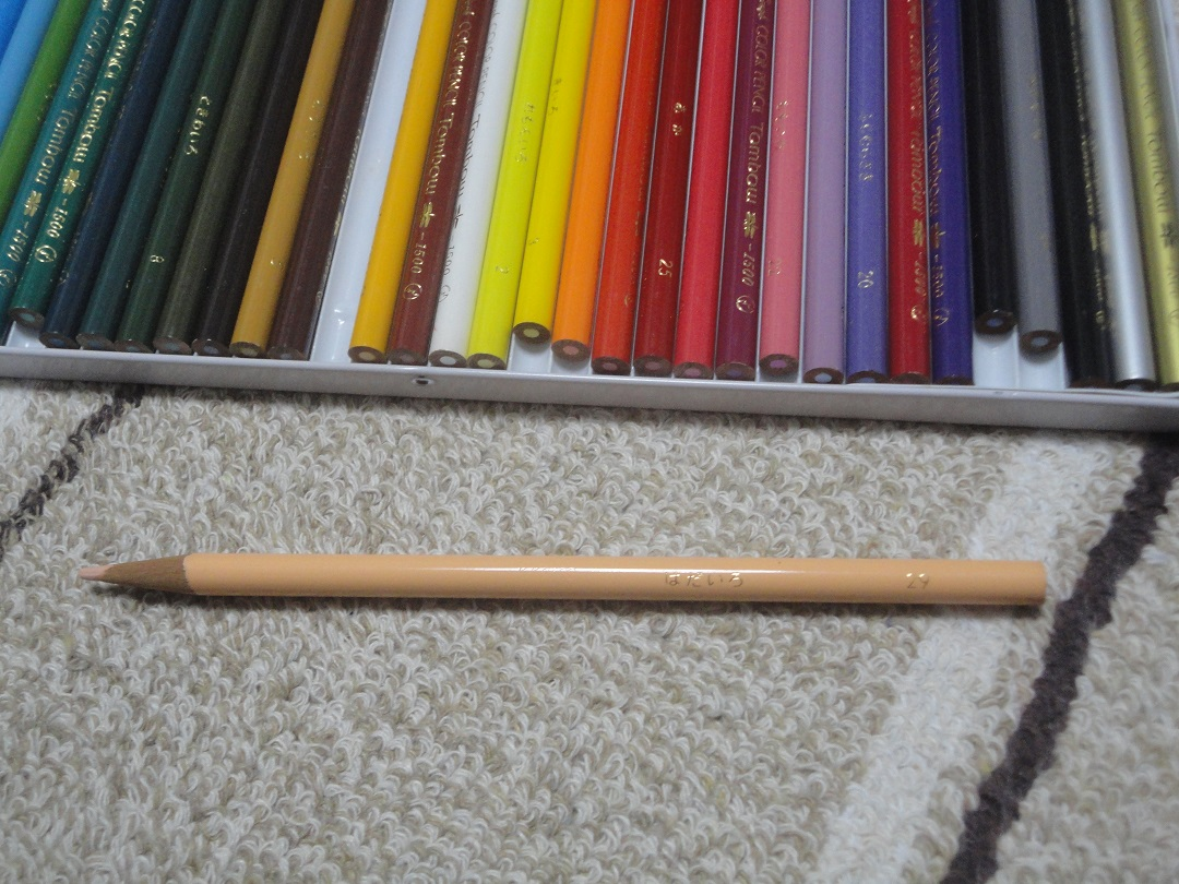 「はだいろ」と書かれた色鉛筆（トンボ鉛筆製）。